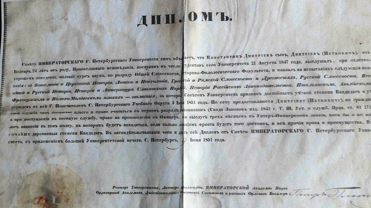 Диплома на Константин Петкович от университета в Санкт Петербург.